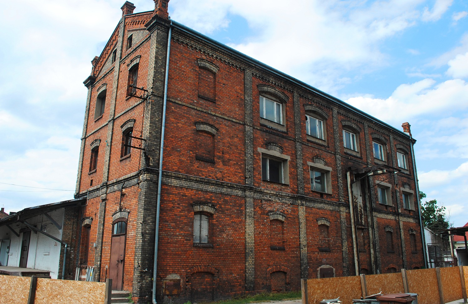 Browar Jerzego Bojańczyka we Włocławku - Główny budynek Browaru